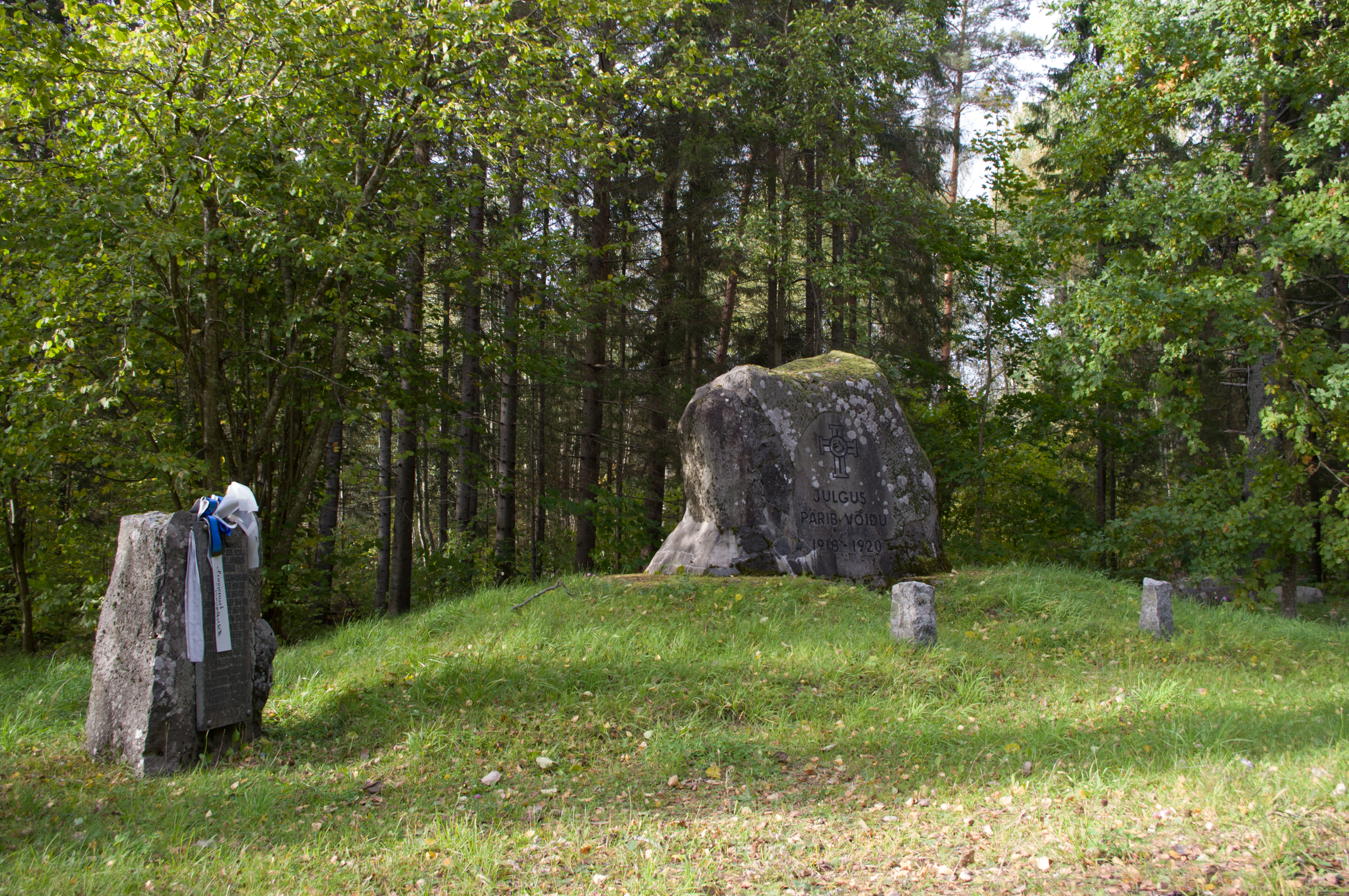 Vabadussõja Punapargi lahingu mälestusmärk